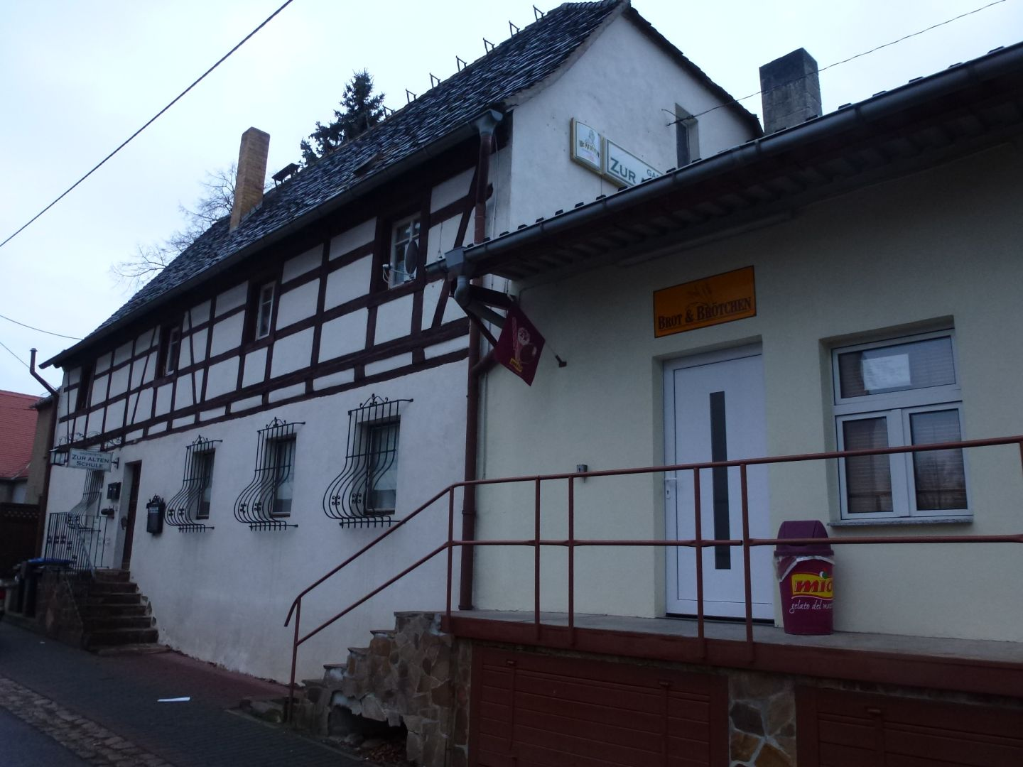 Fachwerk in Großbardau